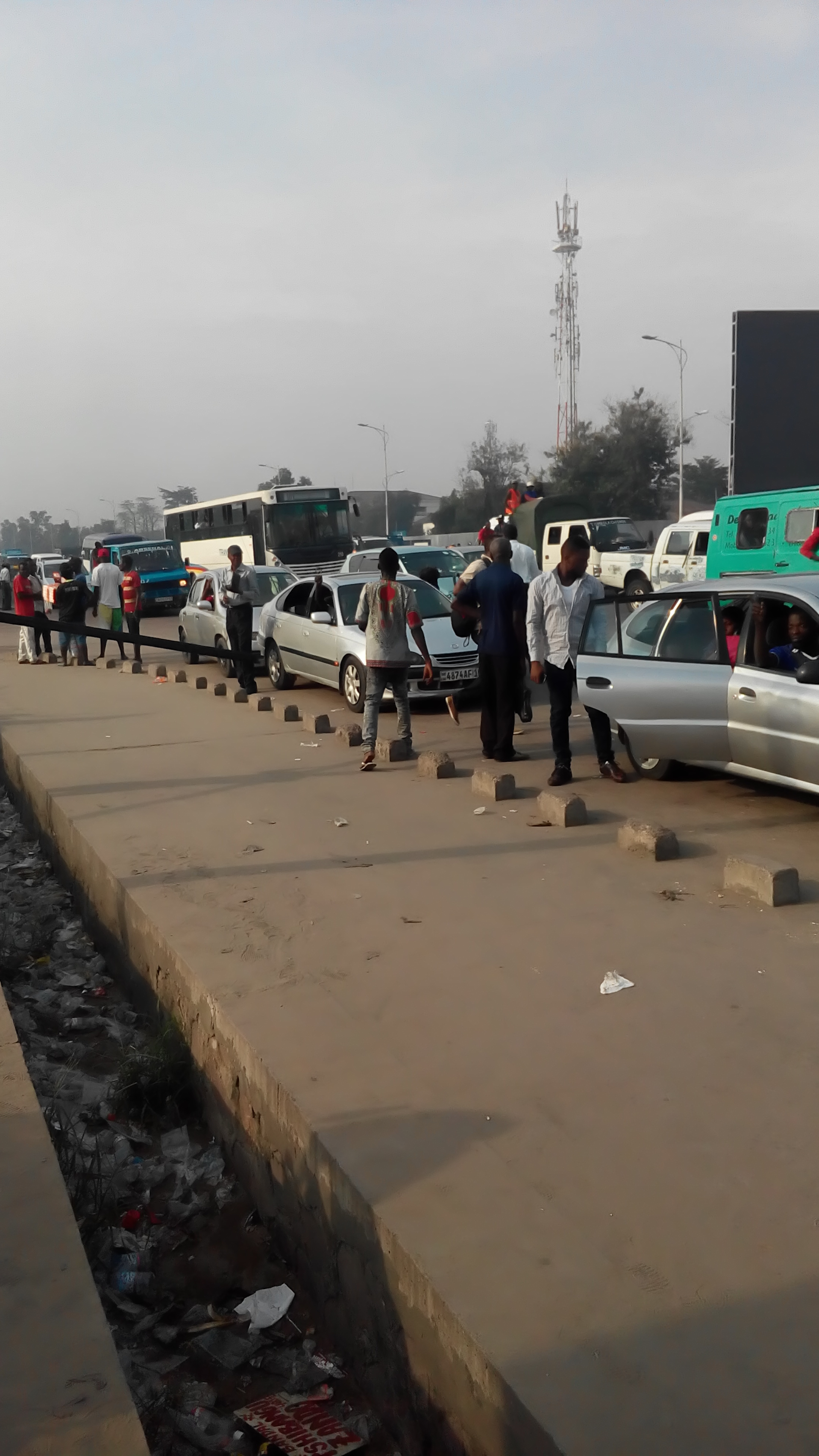 arrêt de bus de 7°Rue Limete à Kinshasa. Des véhicule sur l'Arrêt de Limete 7°Rue, du côté Limete industriel